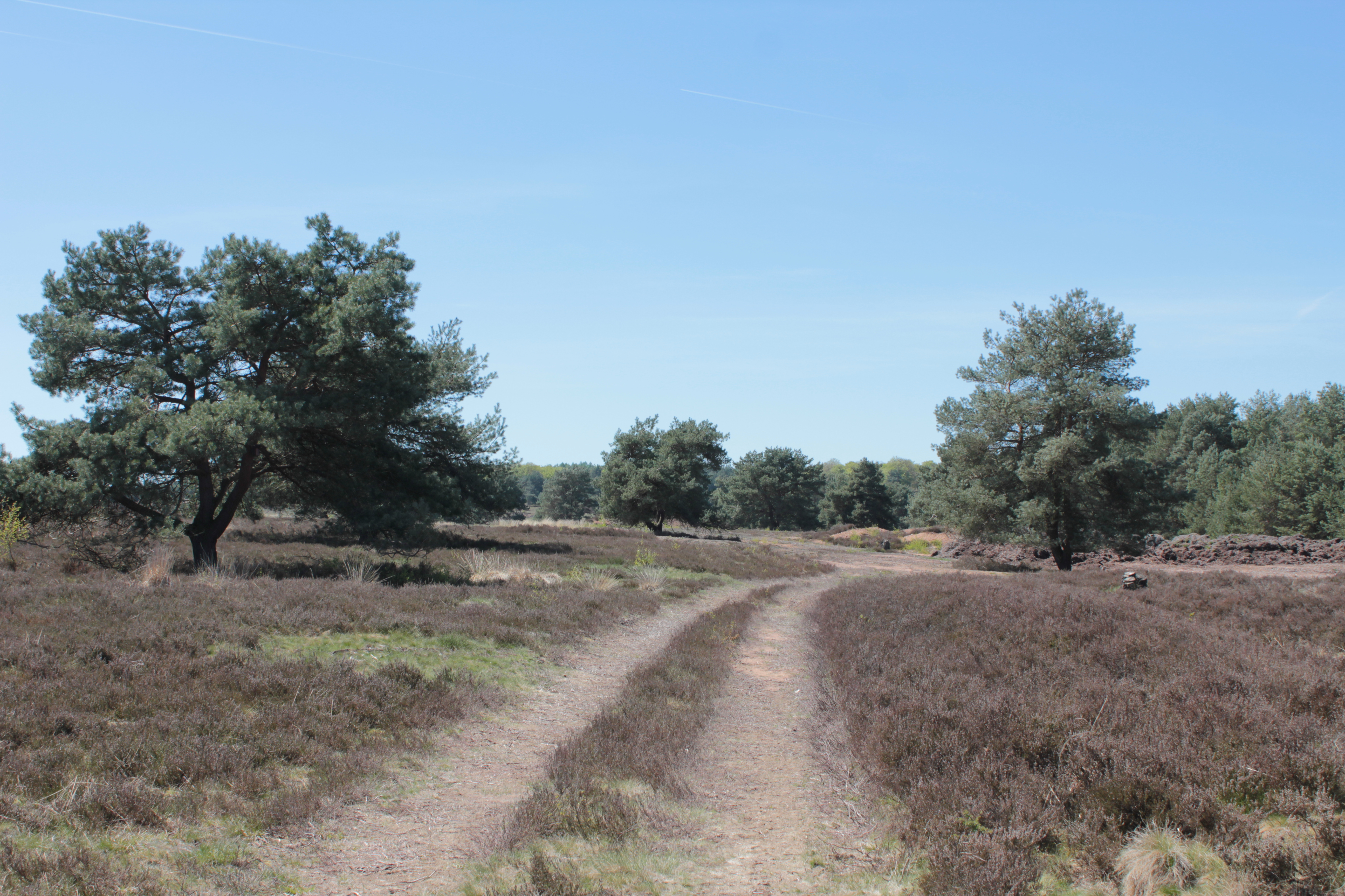 (NSG:RP-335205)_Mehlinger Heide